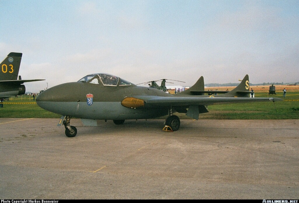 Markus Bonnevier, August 25, 2001